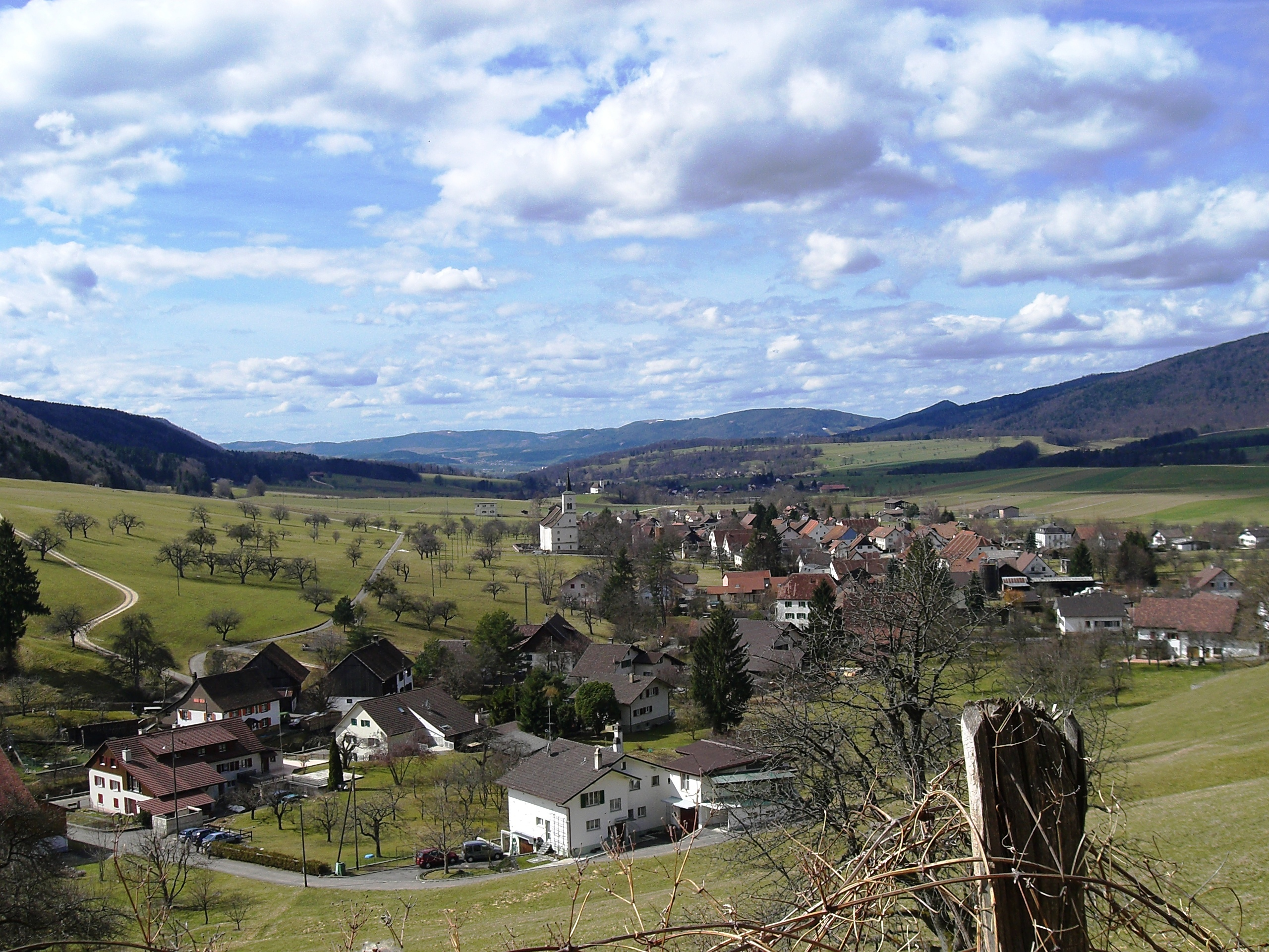 Vue de Mervelier